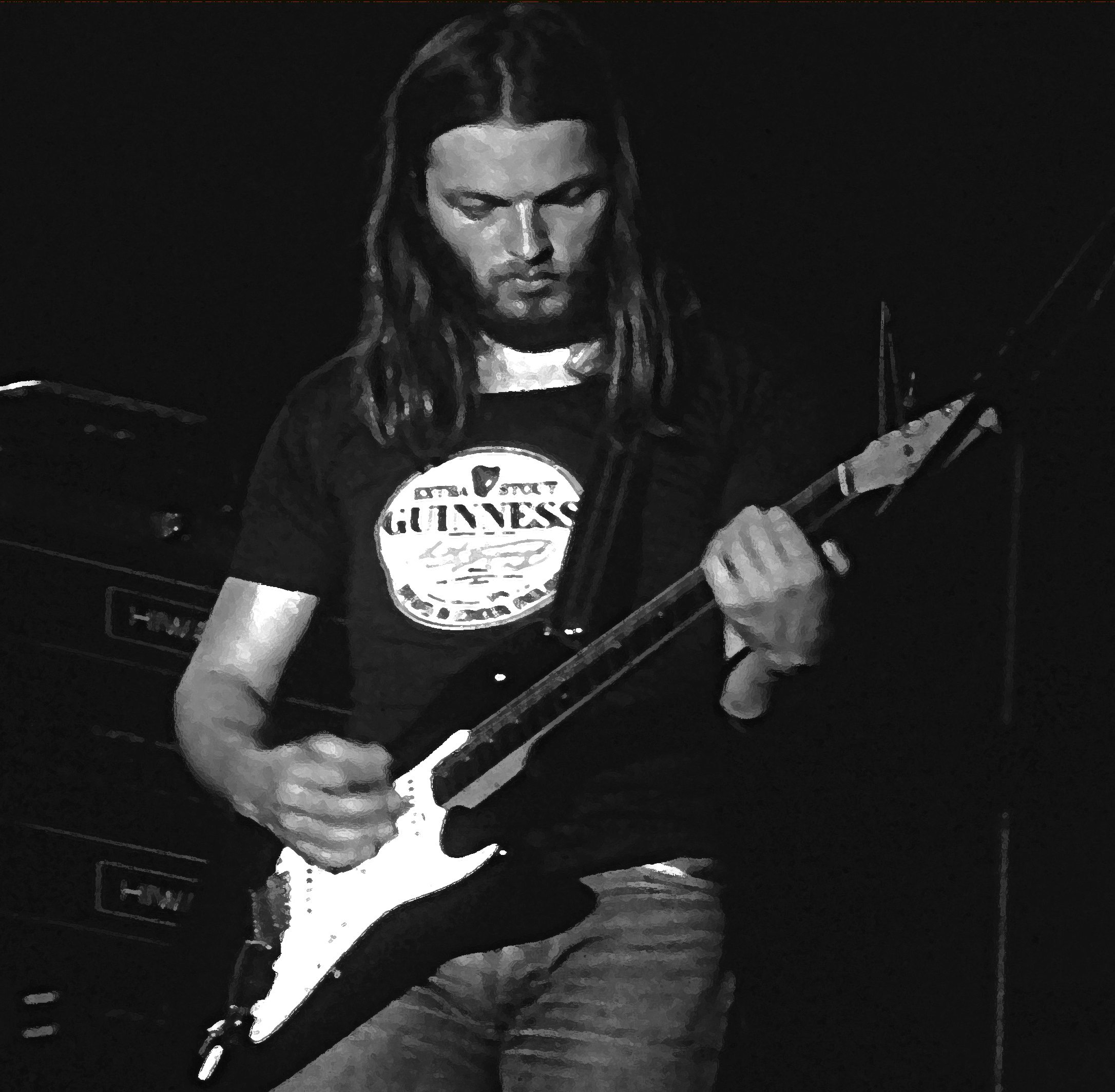 Toulouse fut l’une des trois étapes européennes du Pink Floyd, groupe mythique des années 70. L’après midi, j’échangeais quelques mots en anglais avec David Gilmour guitariste envoûtant qui plus tard prendra les rênes du groupe, succédant à Roger Waters. Le soir, je fus le seul photographe admis sur le plateau. De ses débuts à 2006, Pink Floyd a vendu 250 millions d’albums.